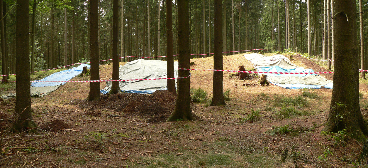 Ausgrabungsbereich Harzhorn